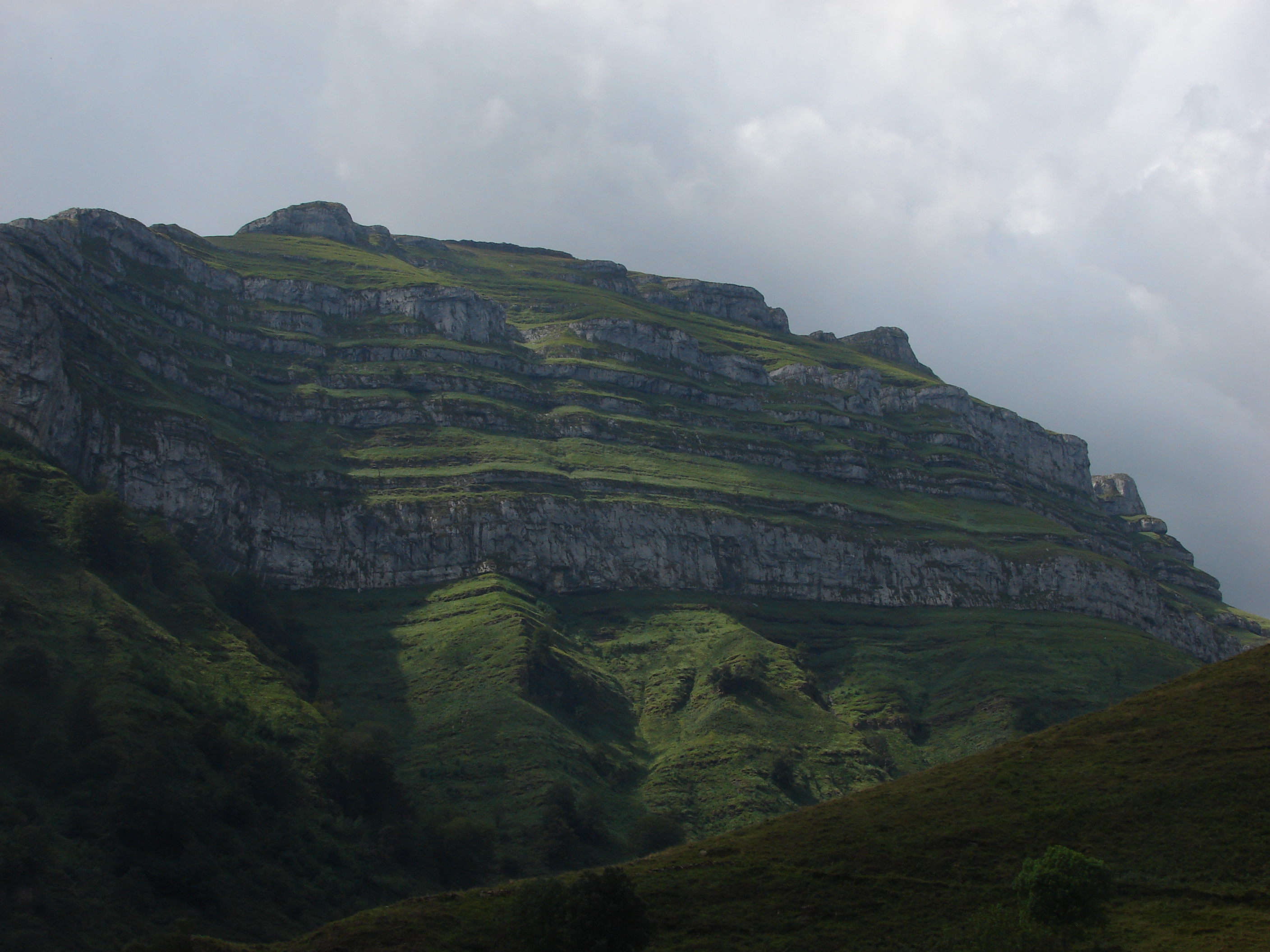 Castros de Hornéu (PN Collados del Asón). CANTABRIA